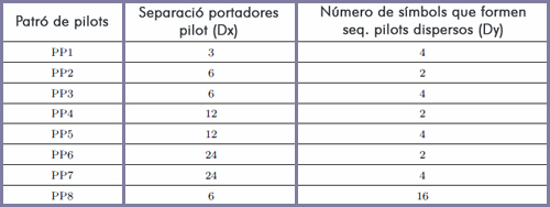 Tabla de patrones piloto